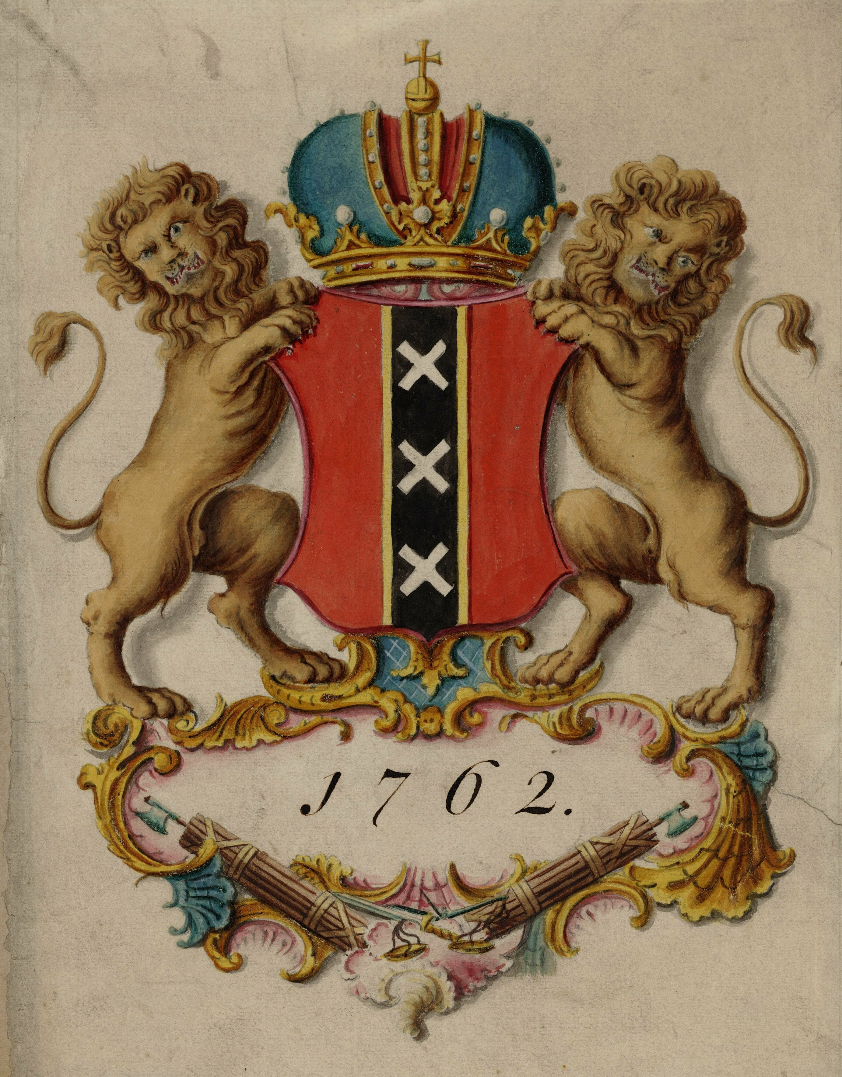 Stadswapen Amsterdam 1762. Techniek: pen en penseel in kleuren.